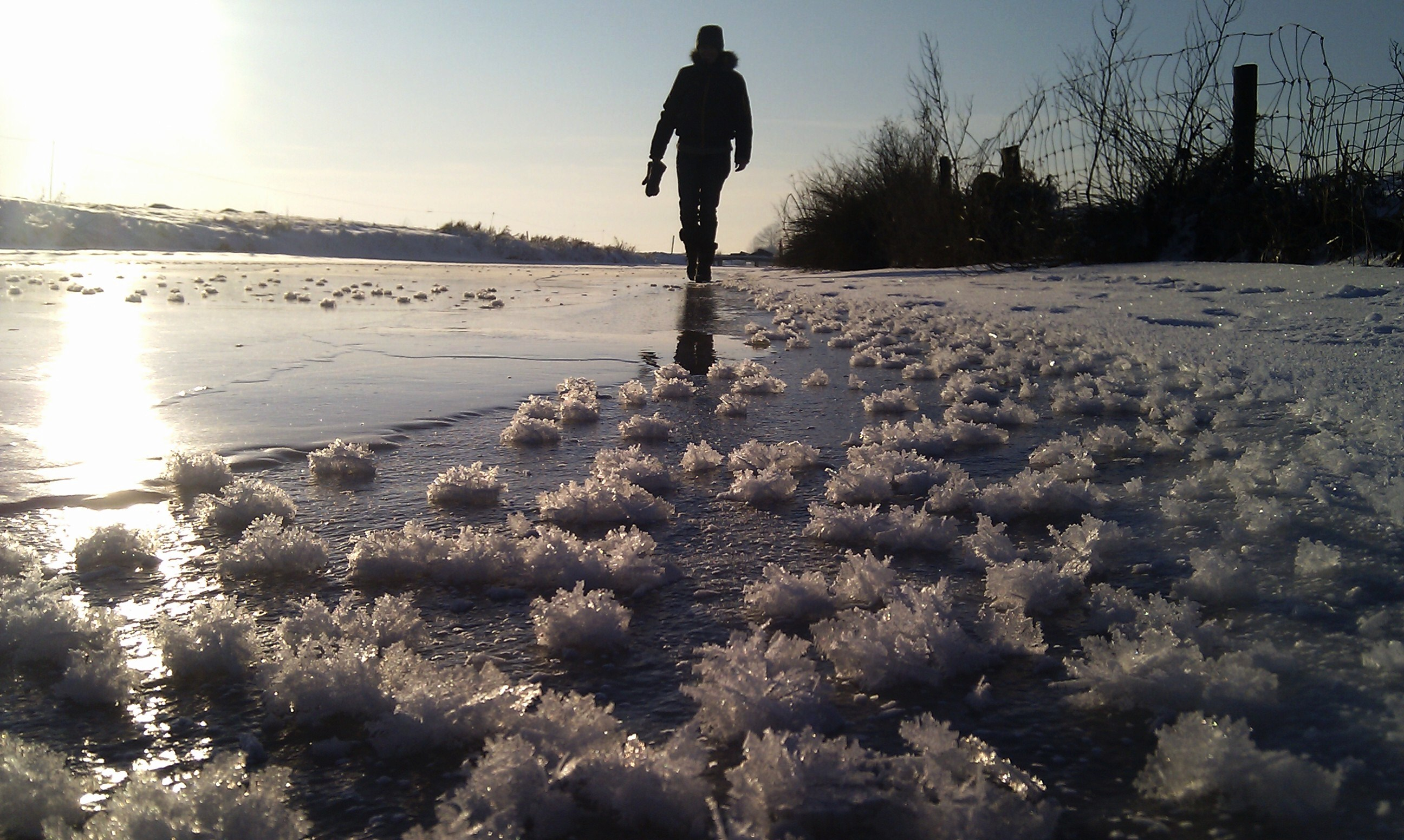 Bevroren sloot in de polder in Willeskop.